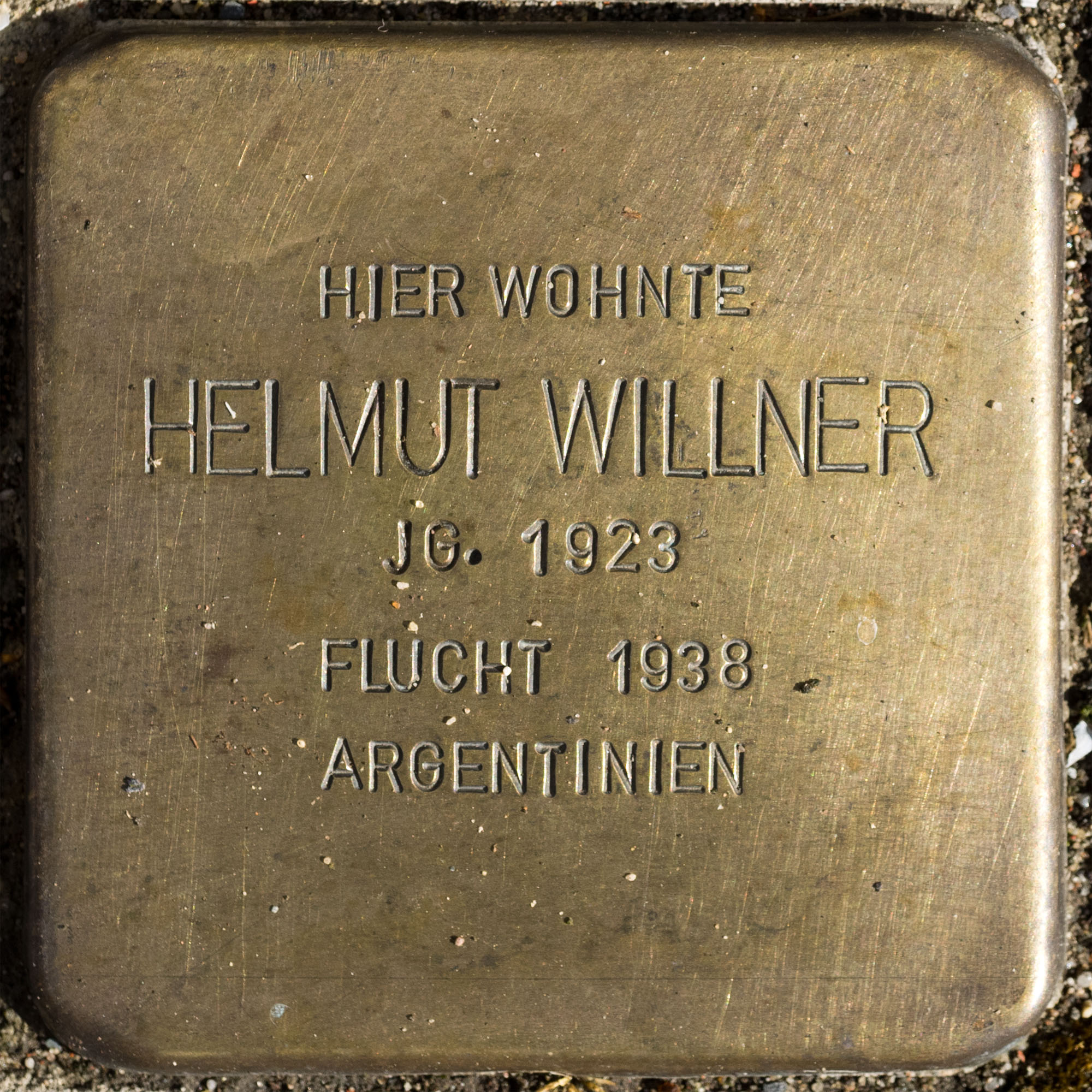 2016 Stolpersteine ToeVo Willner Helmut